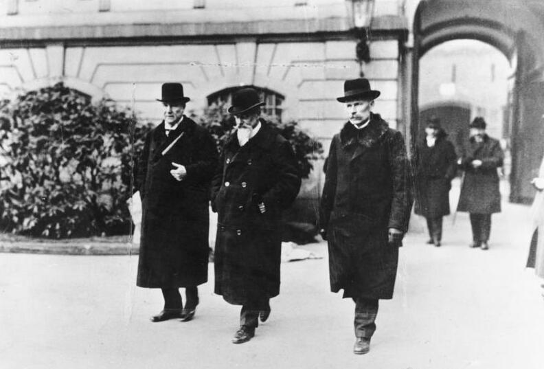 Reichskonferenz des Rates der Volksbeauftragten mit den Vertretern aller Länderregierungen in der Berliner Reichskanzlei, 25.11.1918. - Der Staatssekretär des Auswärtigen, Wilhelm Solf, beim Verlassen der Reichskanzlei (Aufn. Robert Sennecke, 3389)